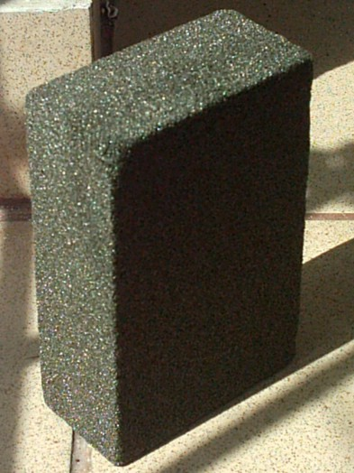 Kostka szkła piankowego